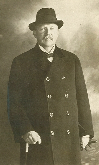 portrett, mann, direktør, bokhandler, forlegger, stående halvfigur, hatt, frakk, stokk.